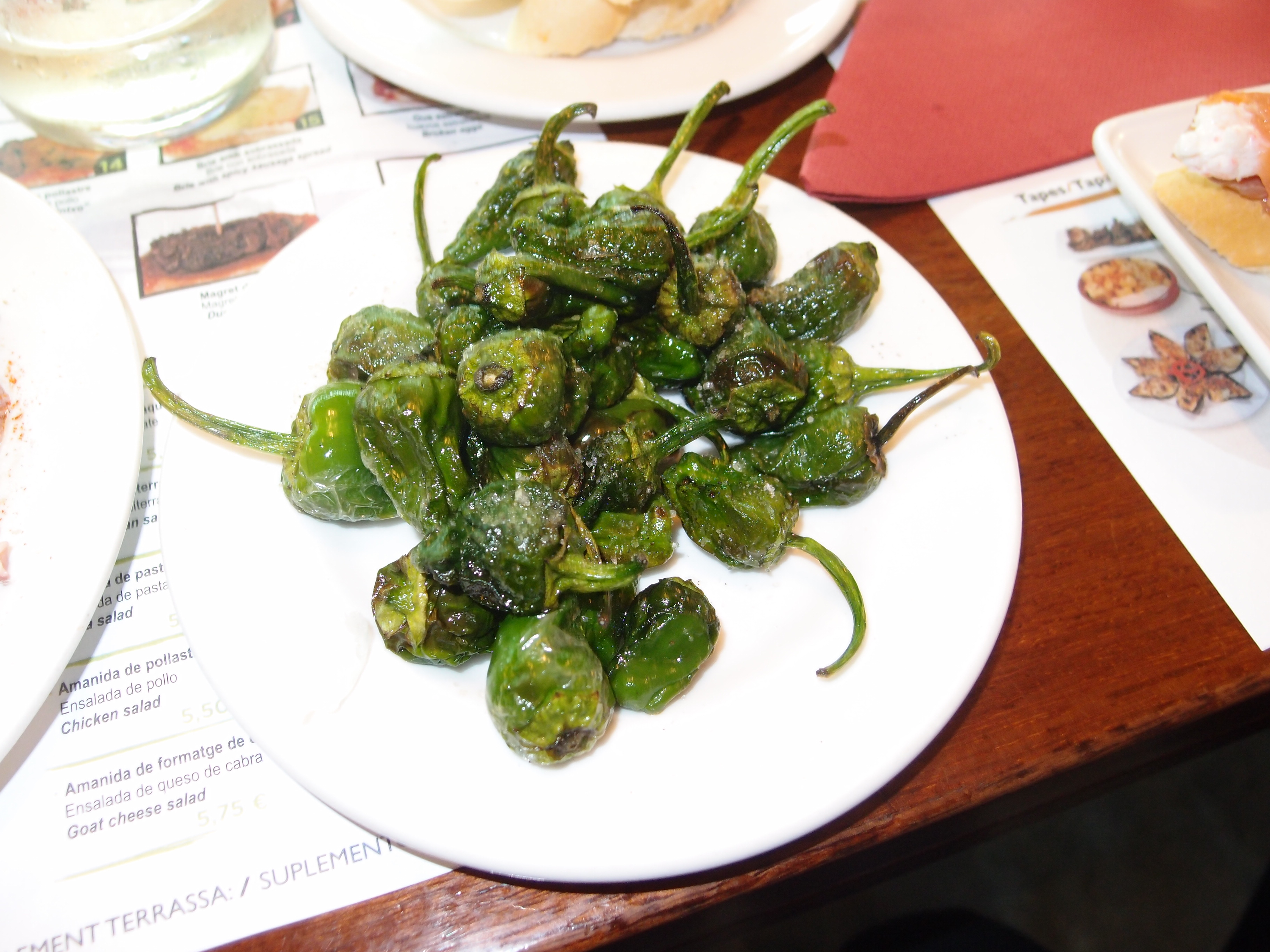 Verzehrfertig zubereitete Pimientos de Padrón Datum: 16.09.2012 Urheber: M. Pfeiffer alias Benutzer:Gordito1869 Quelle: privates Fotoarchiv des Urhebers